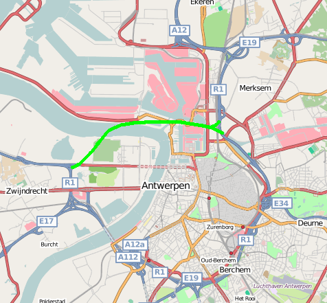 Oosterweelverbinding aangegeven op kaart openstreetmap